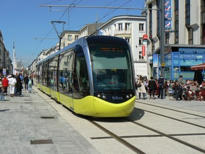 Station Château